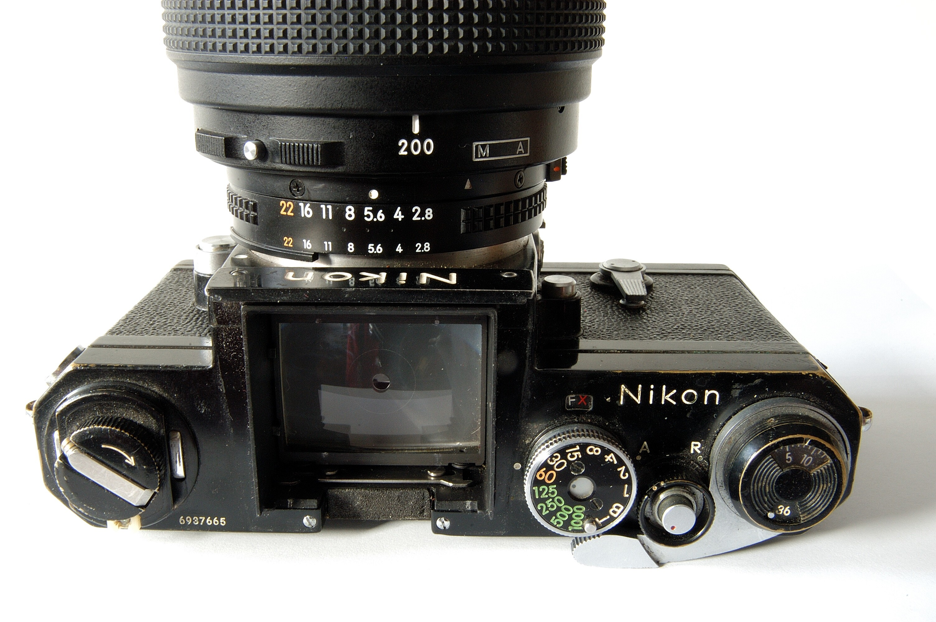 Nikon F with AF Nikkor 80-200 mm 1:2,8 ED